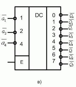 Дешифратор. Приклад схеми дешифратора 3 на 8